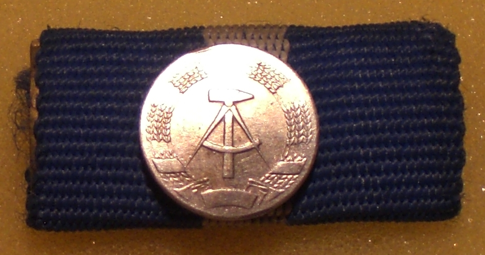 Interimsspange der Lebensrettungsmedaille der DDR in der zweiten Form